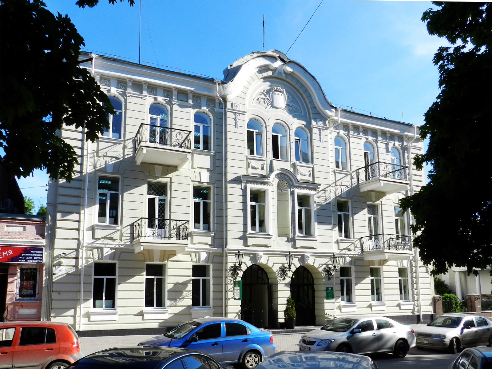 Доходный Дом Л.Н. Кремер, 1900 год. Ростов-на-Дону